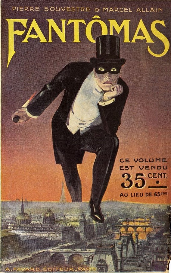 Couverture du premier volume de la série Fantômas par Pierre Souvestre et Marcel Allain, Paris, éditions Fayard, 1911. Illustration anonyme.